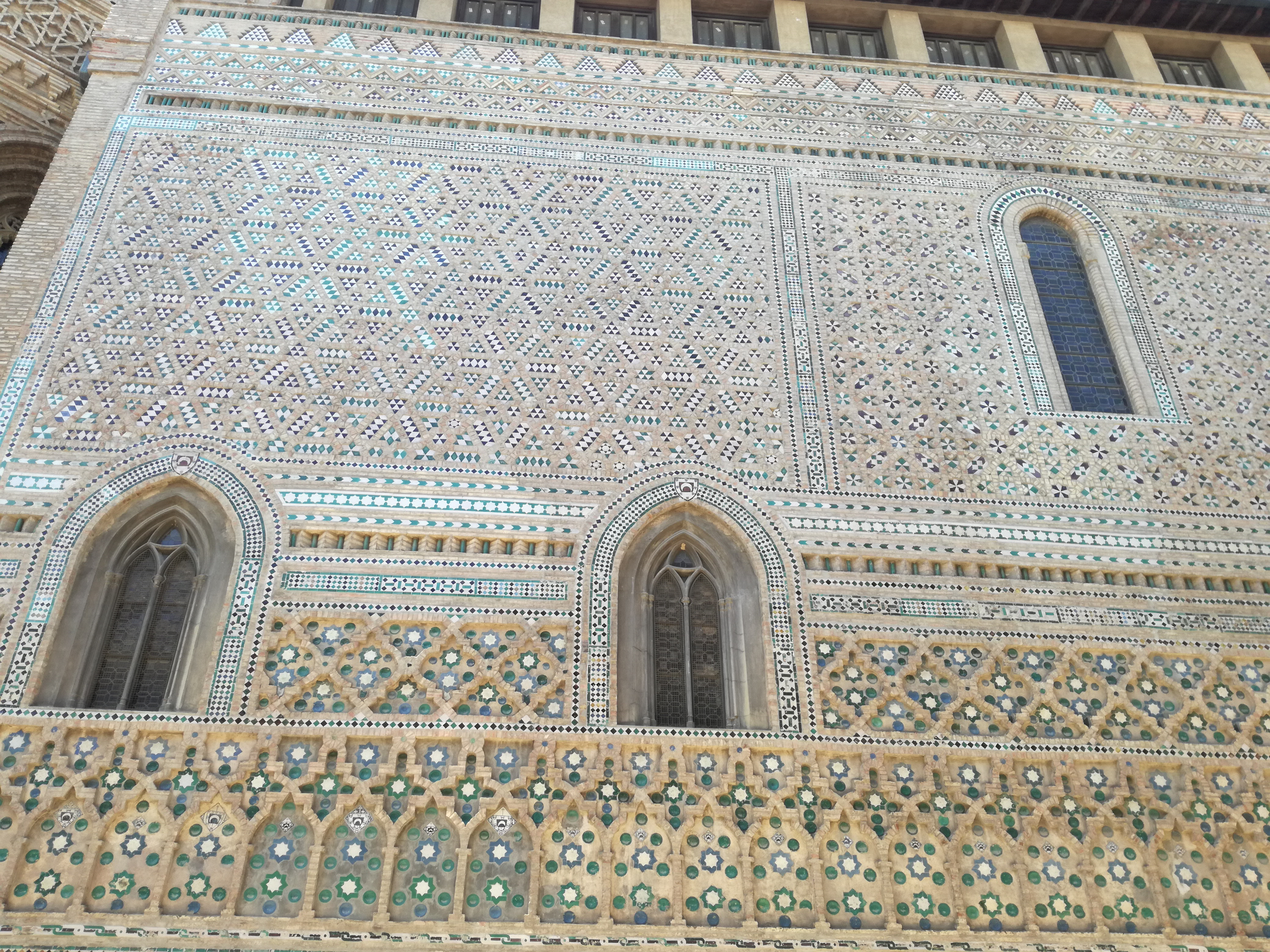 Fiancata della Seo